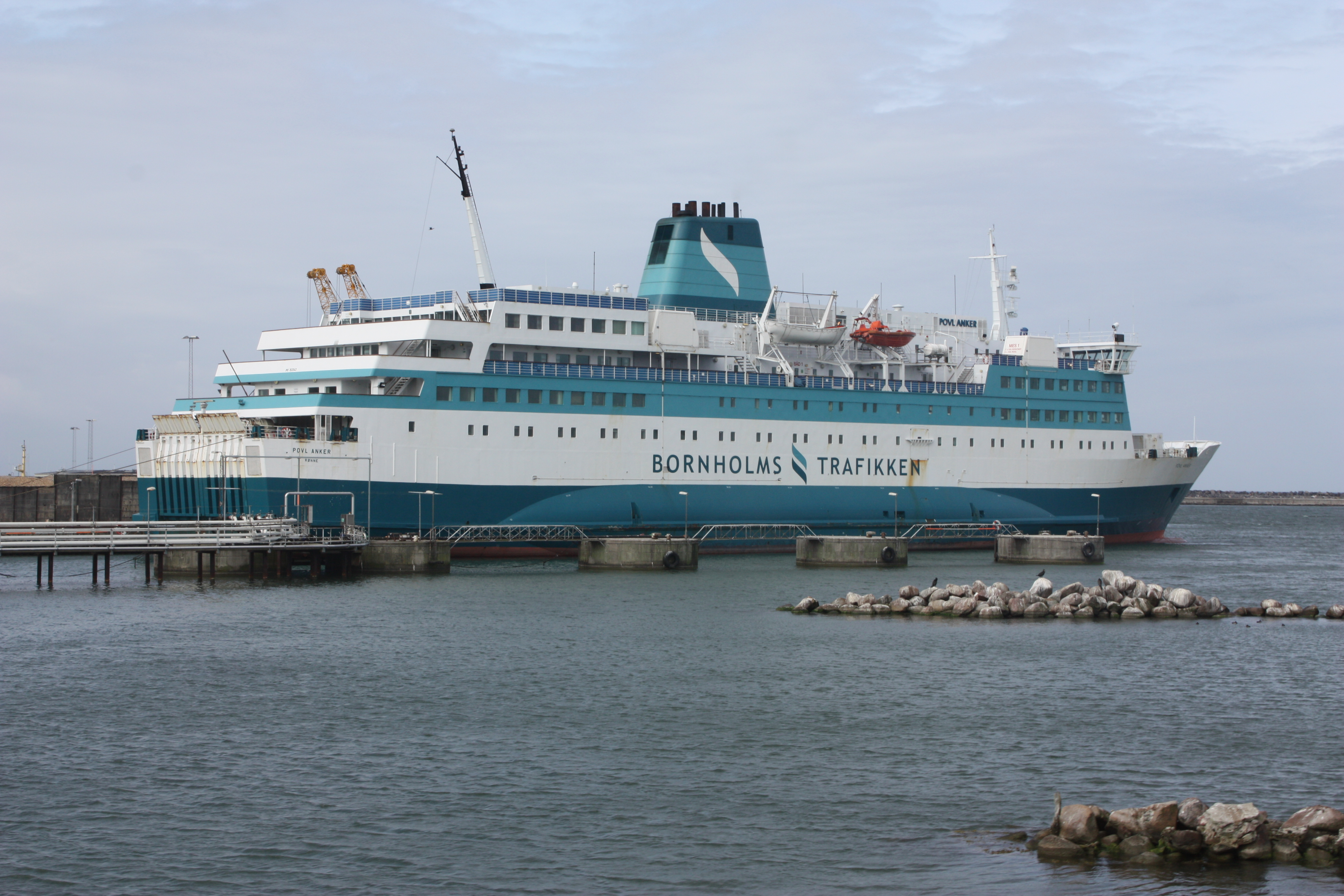 MS Povl Anker, Rønne, Borholm, August, 2009